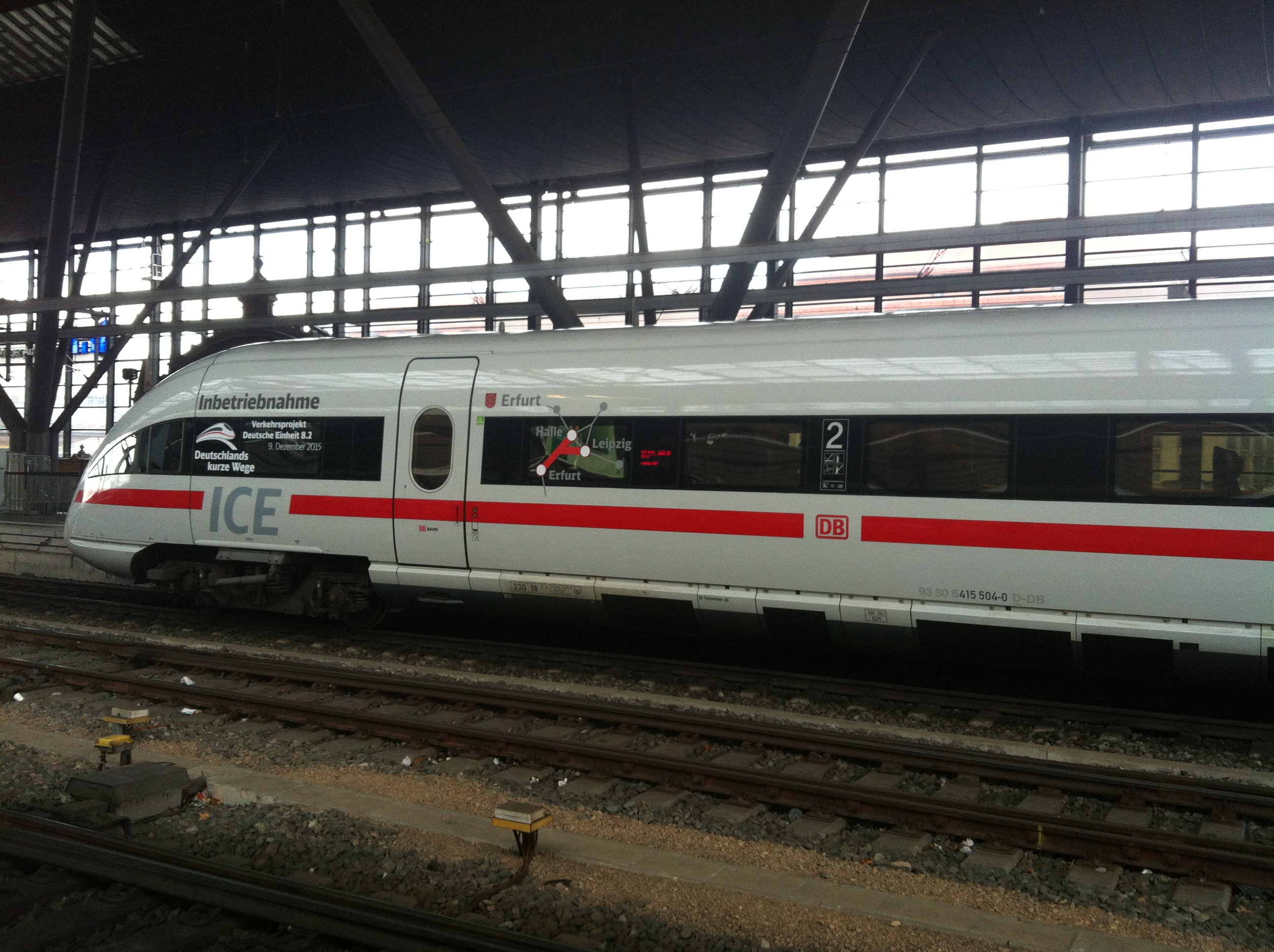 Der ICE-T-Triebzug 1504 Erfurt anlässlich der Eröffnungsfahrt für die Schnellfahrstrecke Erfurt–Halle/Leipzig